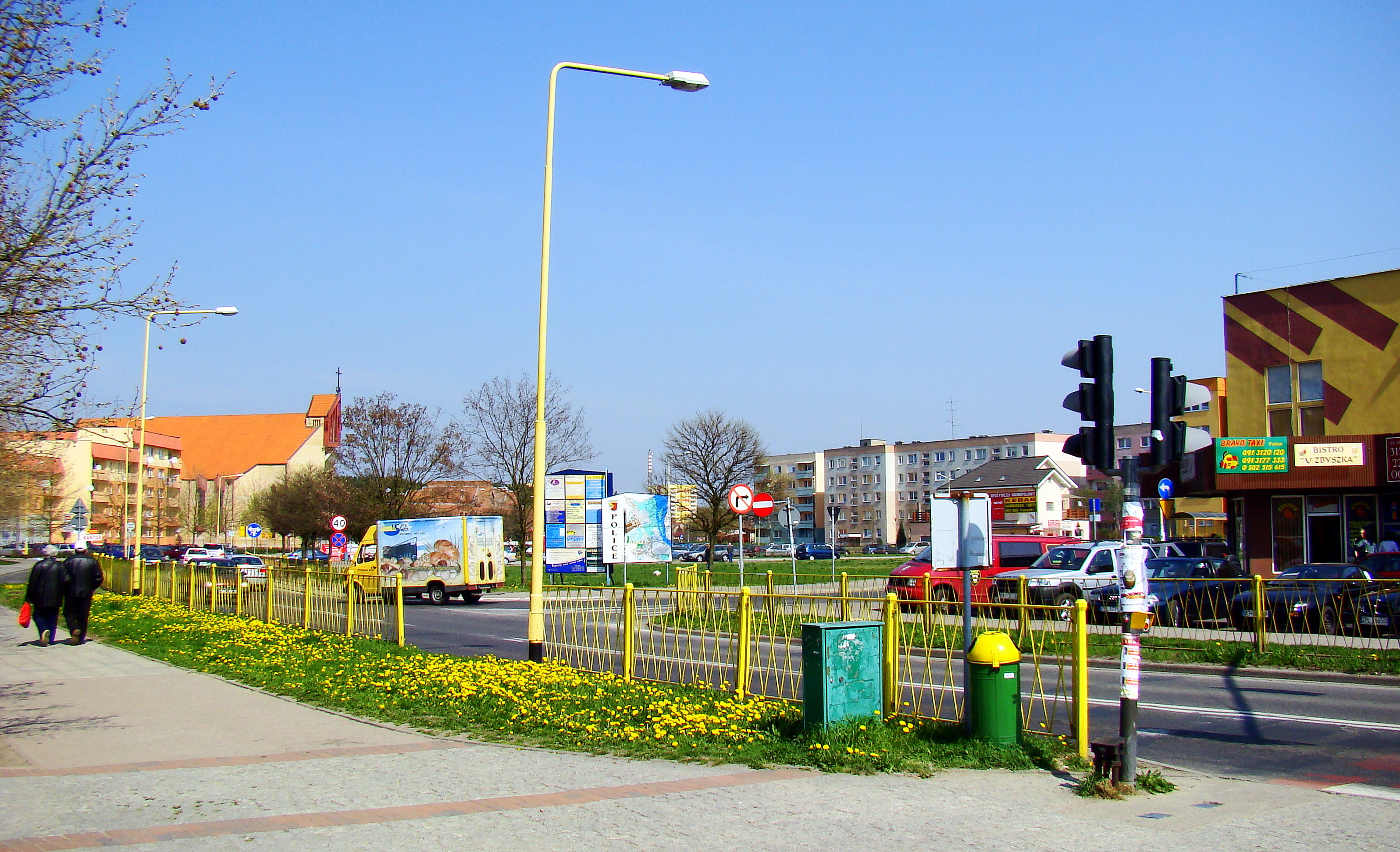 Osiedle Chemik (Police, Województwo zachodniopomorskie), Polska